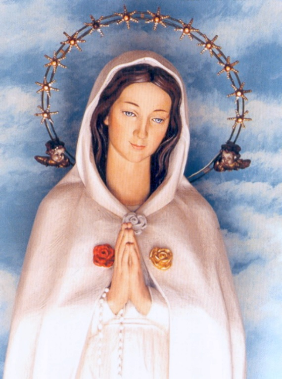 ローザ ミステリカの画像